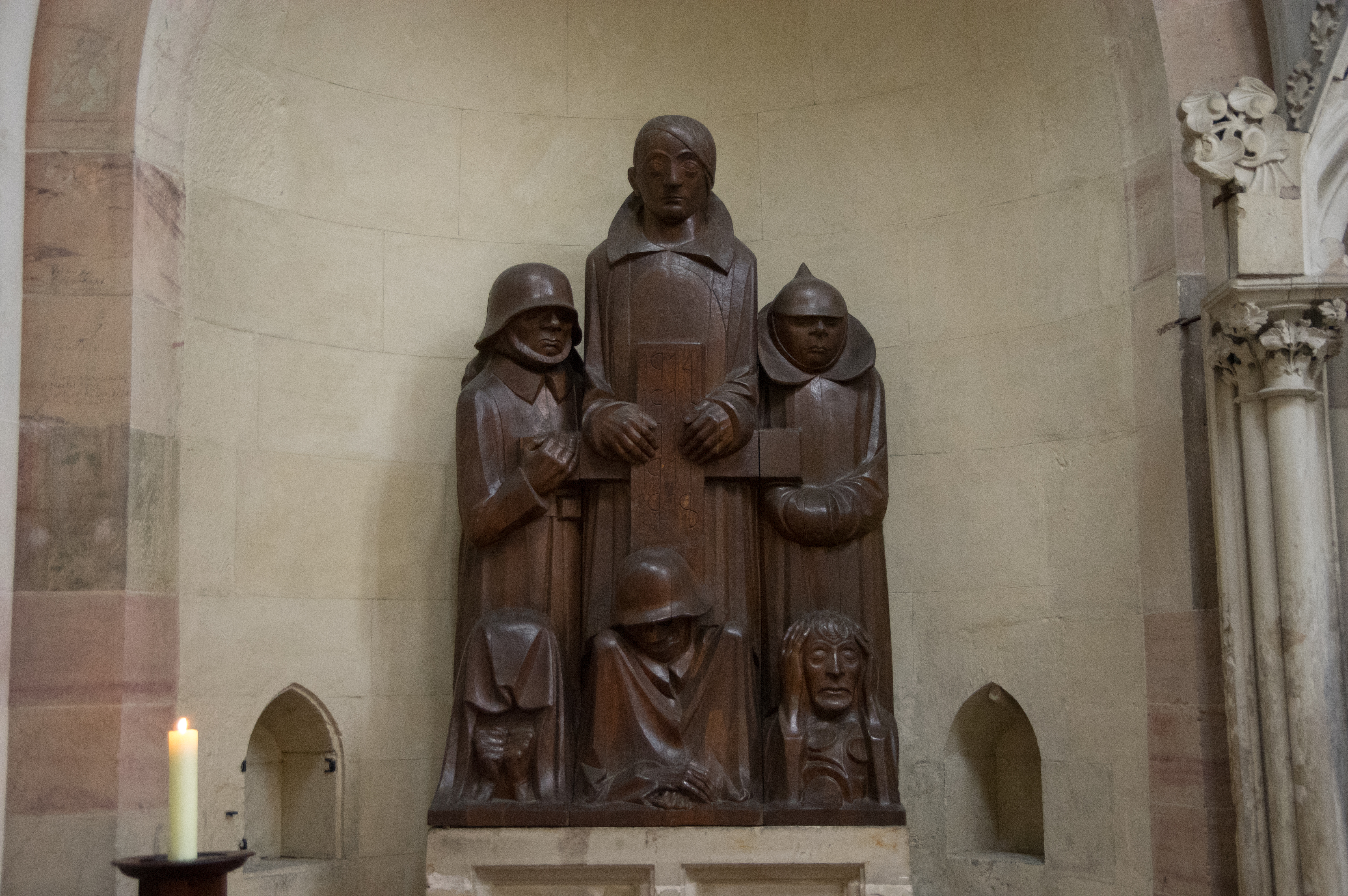 Magdeburg in Sachgsen Anhalt. Der Magdeburger Dorm steht unter Denkmalschutz. Das Bild zeigt ein Teil des Inneres.